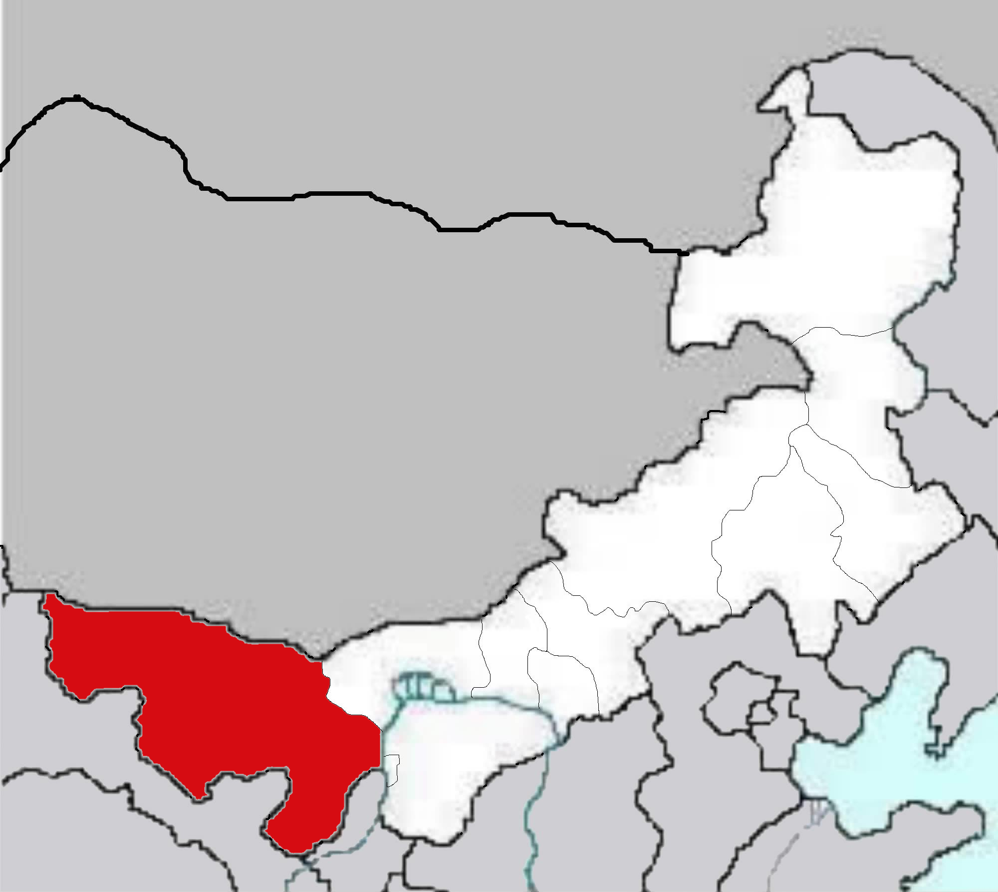 Inner Mogolia Maps